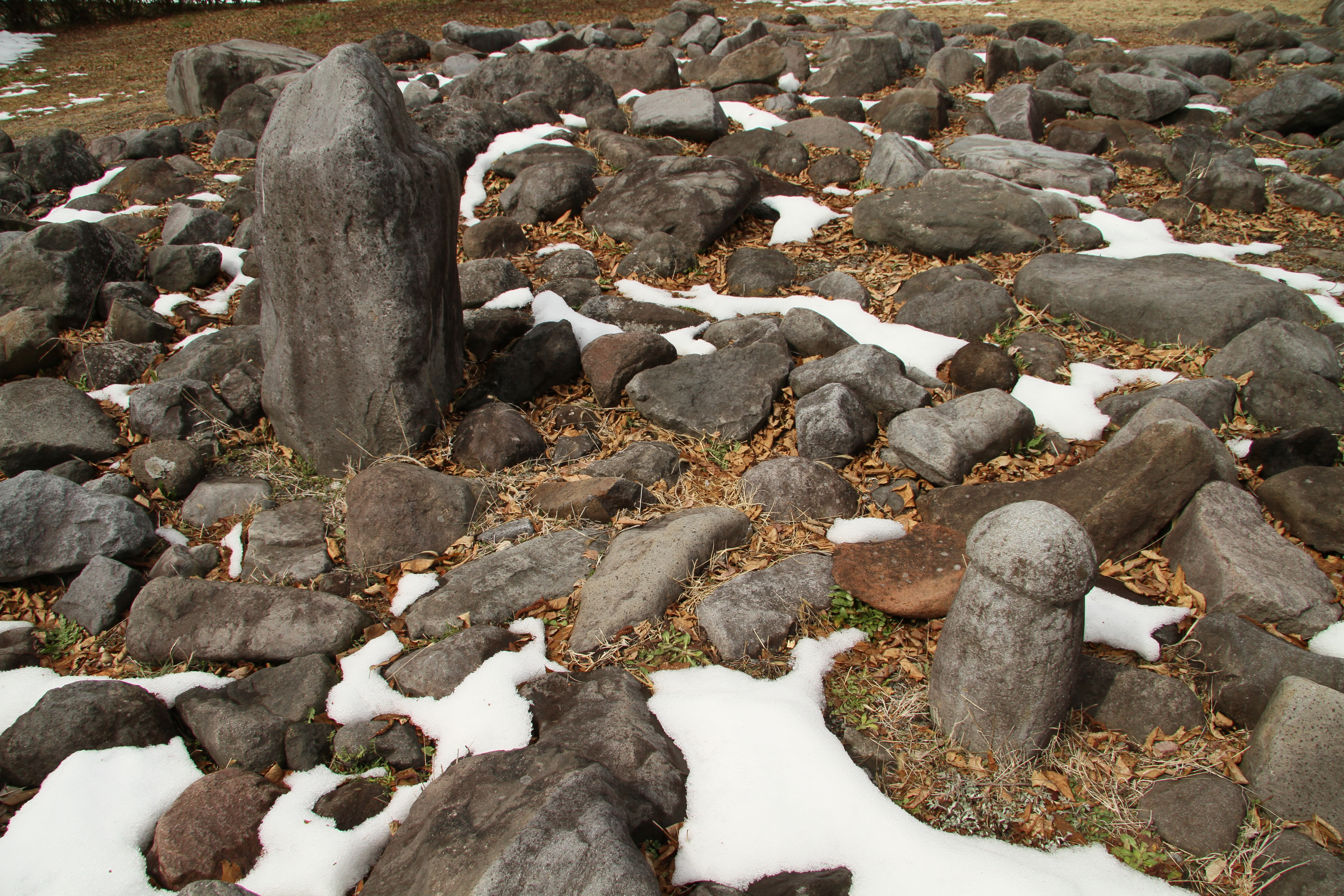 金生遺跡の配石遺構